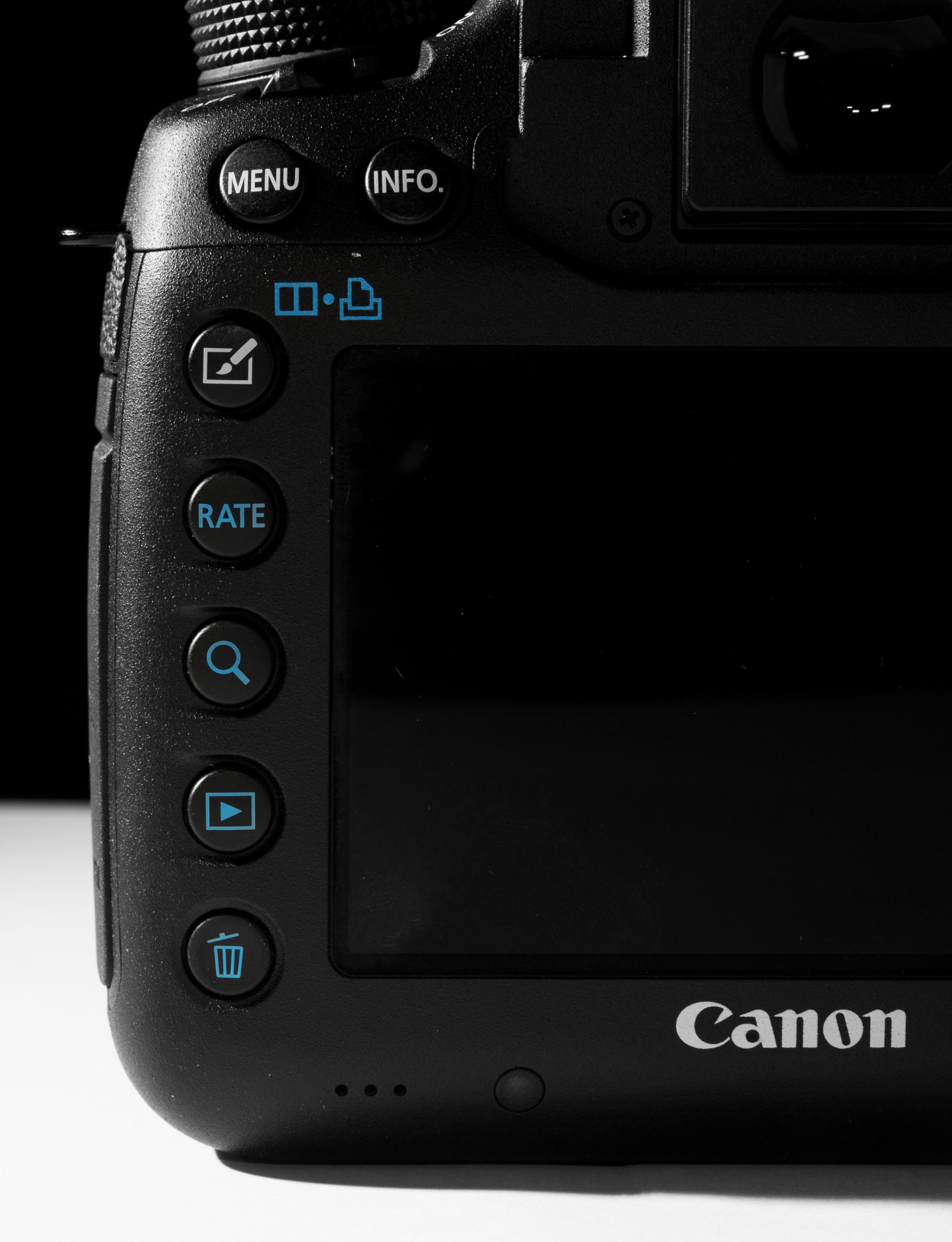 Back side of the Canon EOS 5D Mark III